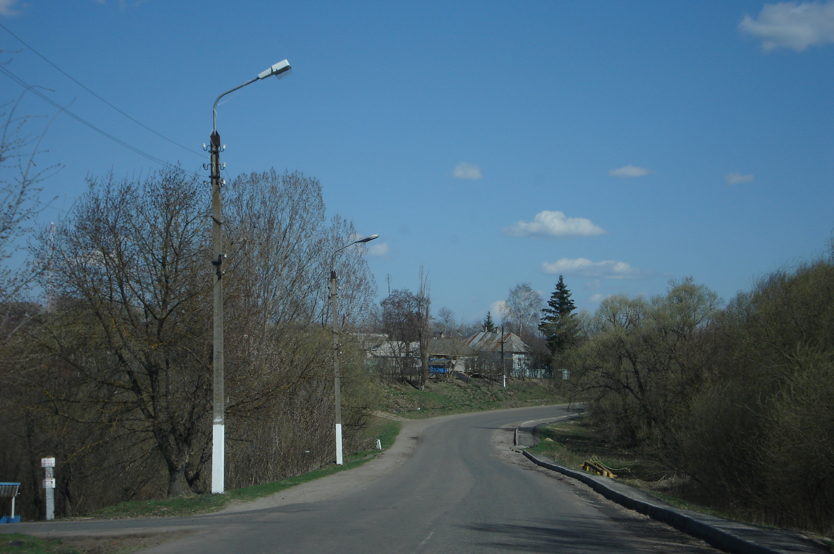 Въезд в Большое Солдатское